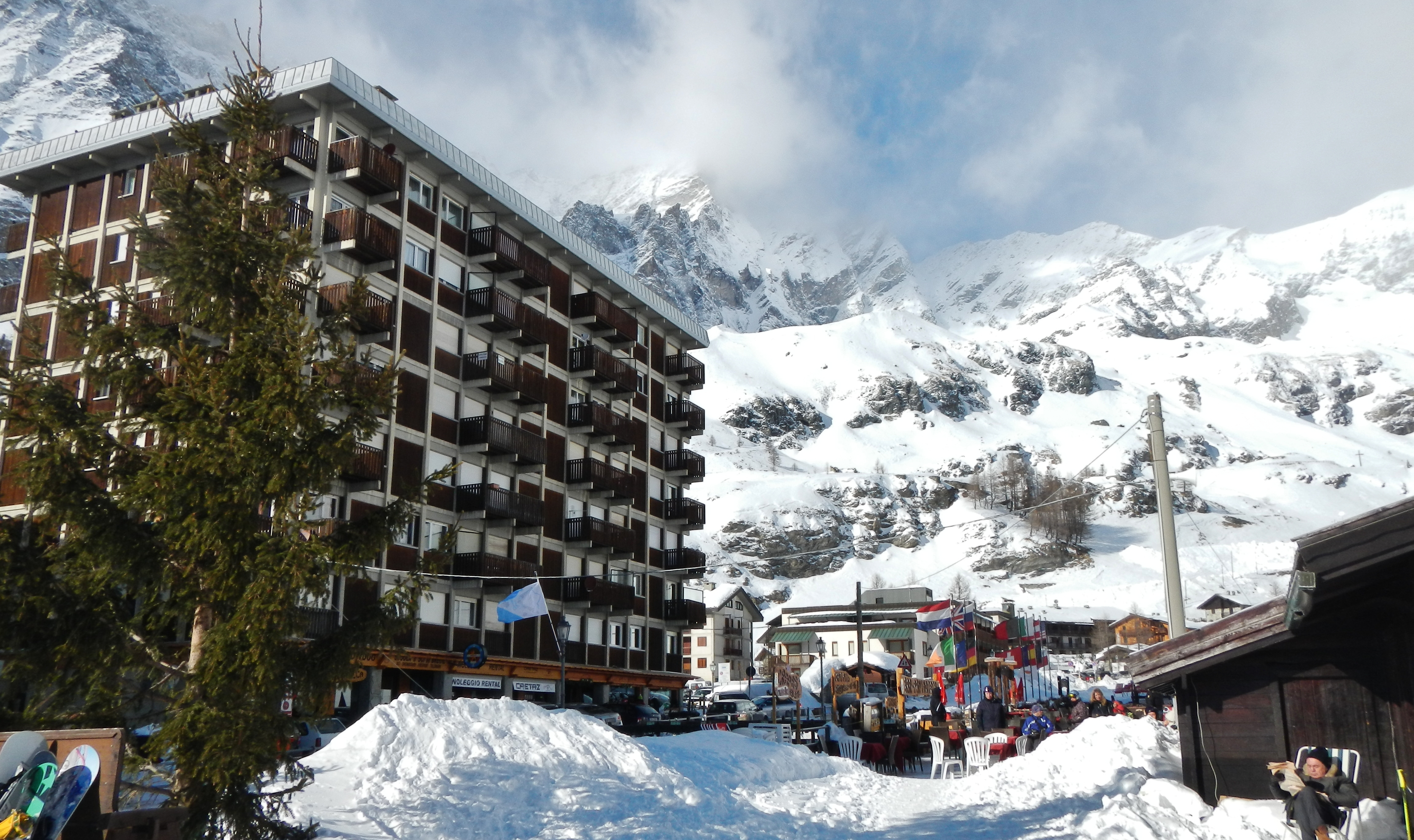 Breuil-Cervinia